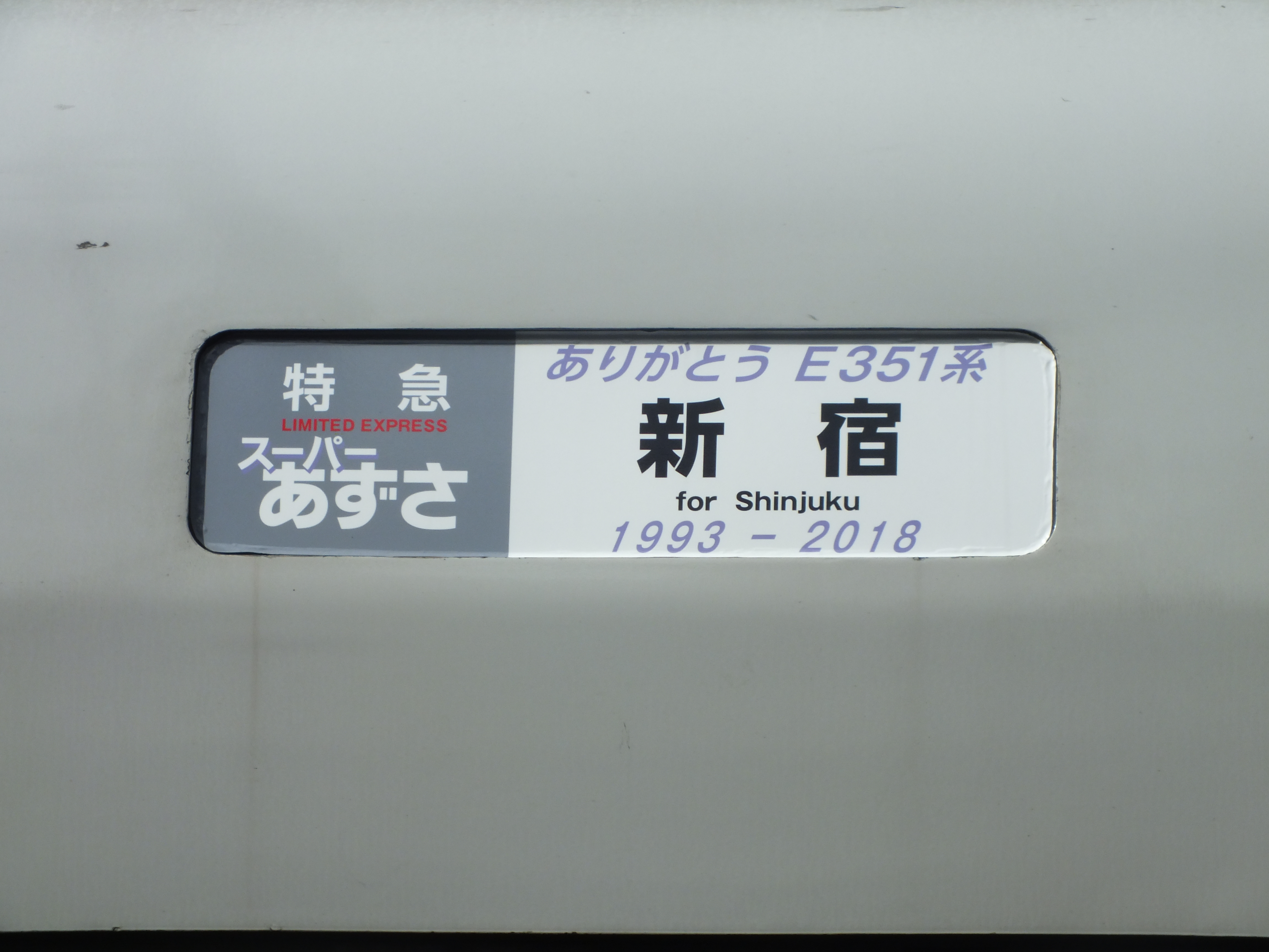 中野駅停車中に撮影したE351系ラストラン列車の特製側面方向幕